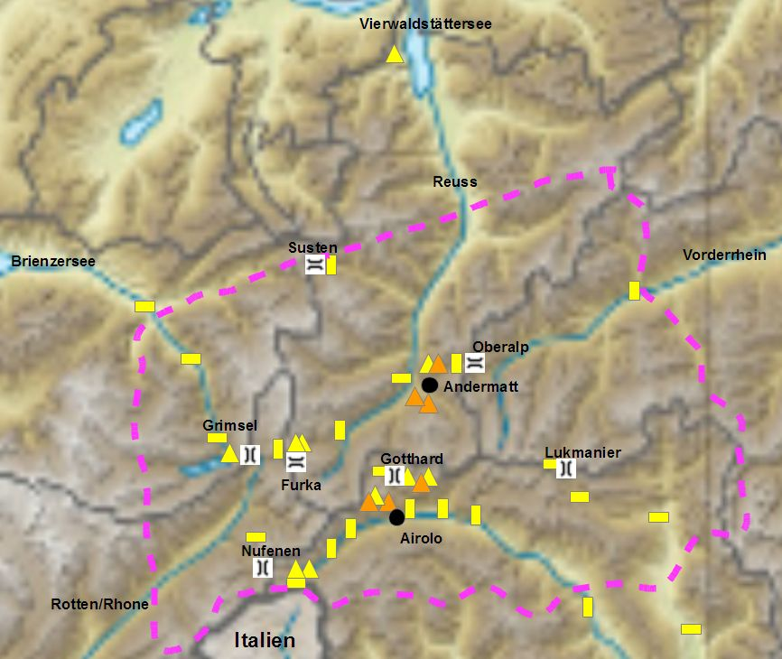 Karte des Festungsraumes St. Gotthard, Schweiz